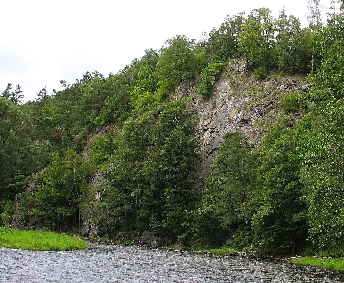 Zřícenina hradu Maškovec při pohledu od Vltavy